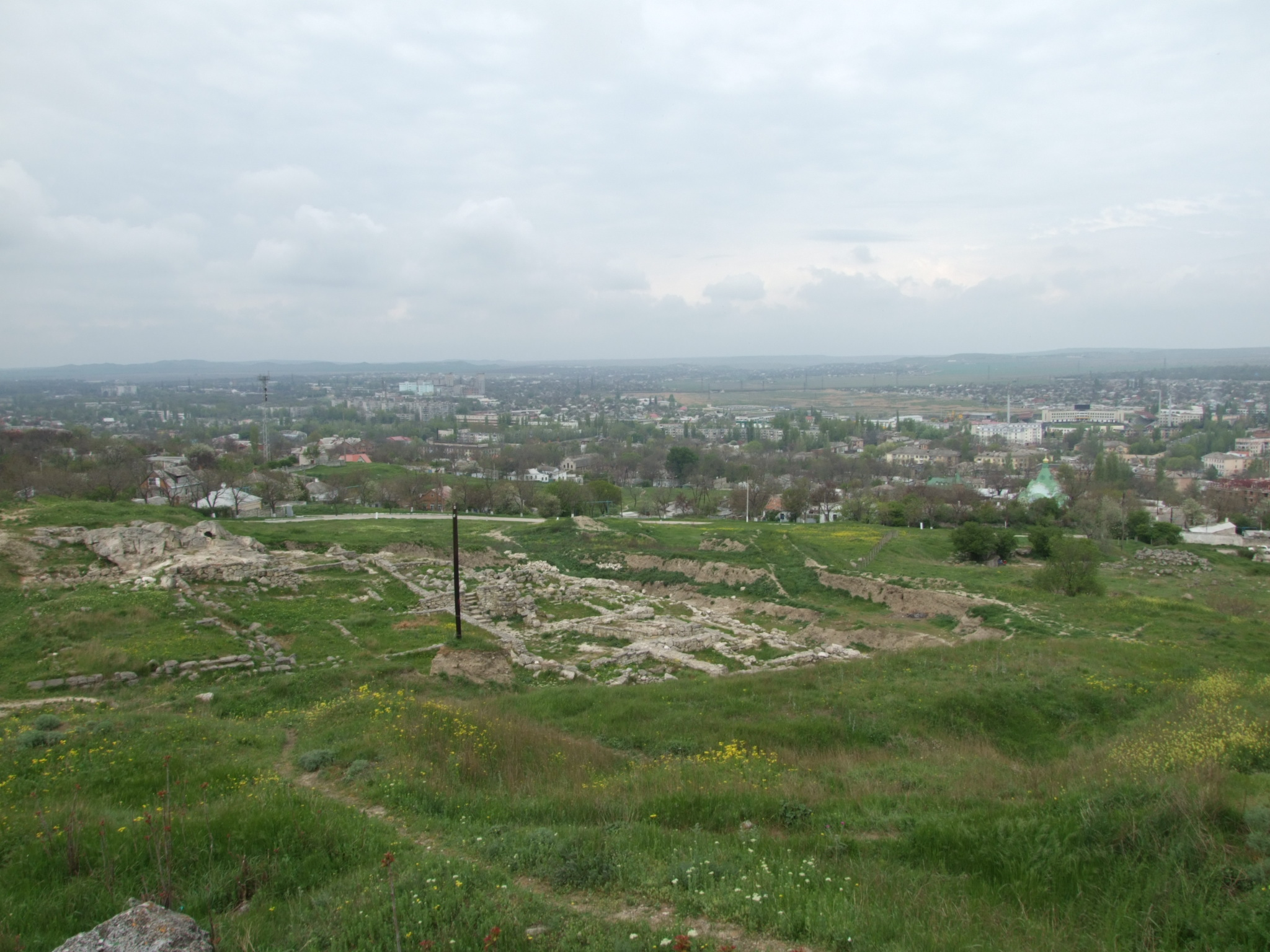 Археологічний комплекс «Стародавнє місто Пантикапей»